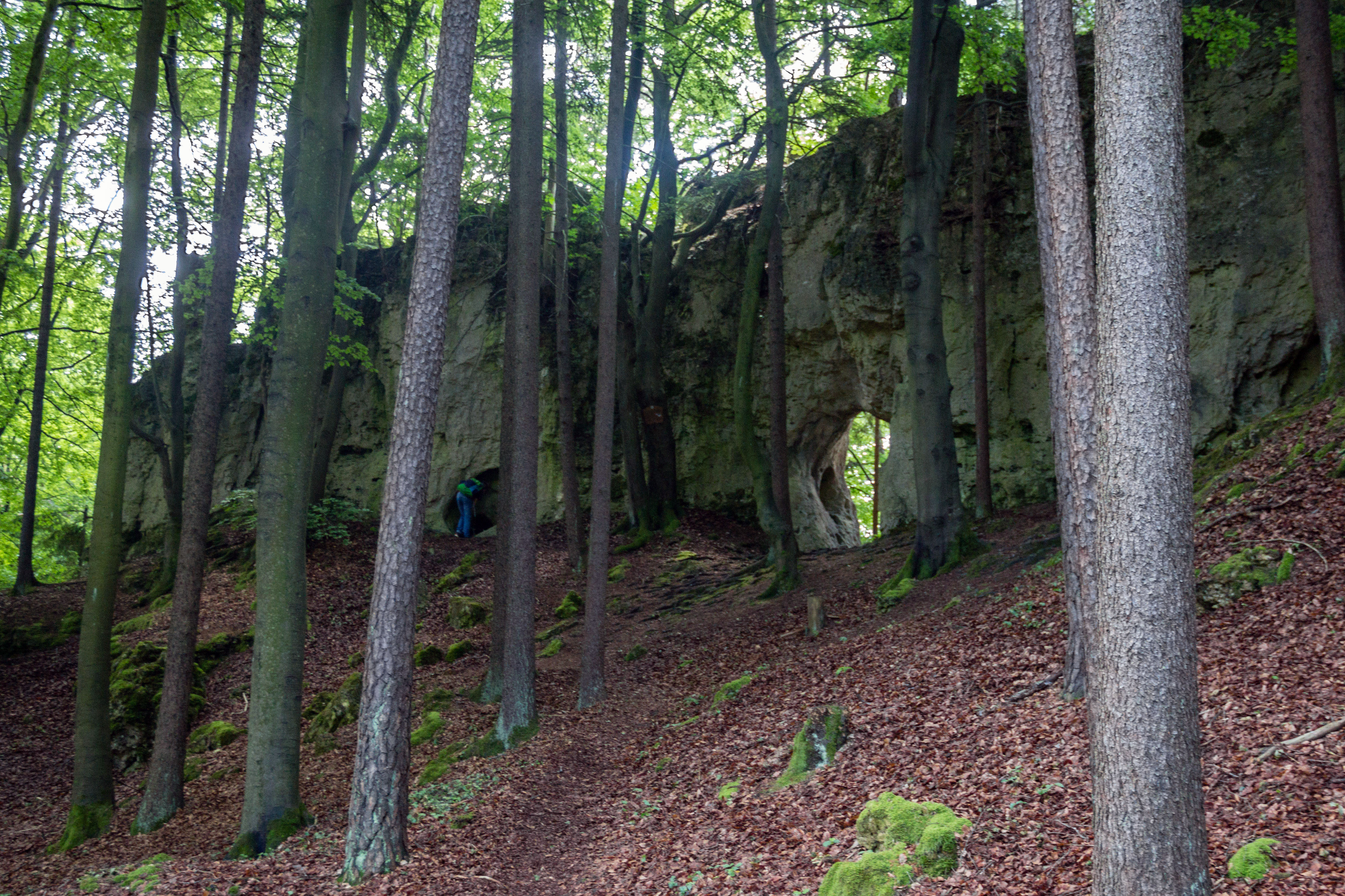 Türkenfelsen, Geotop und Naturdenkmal